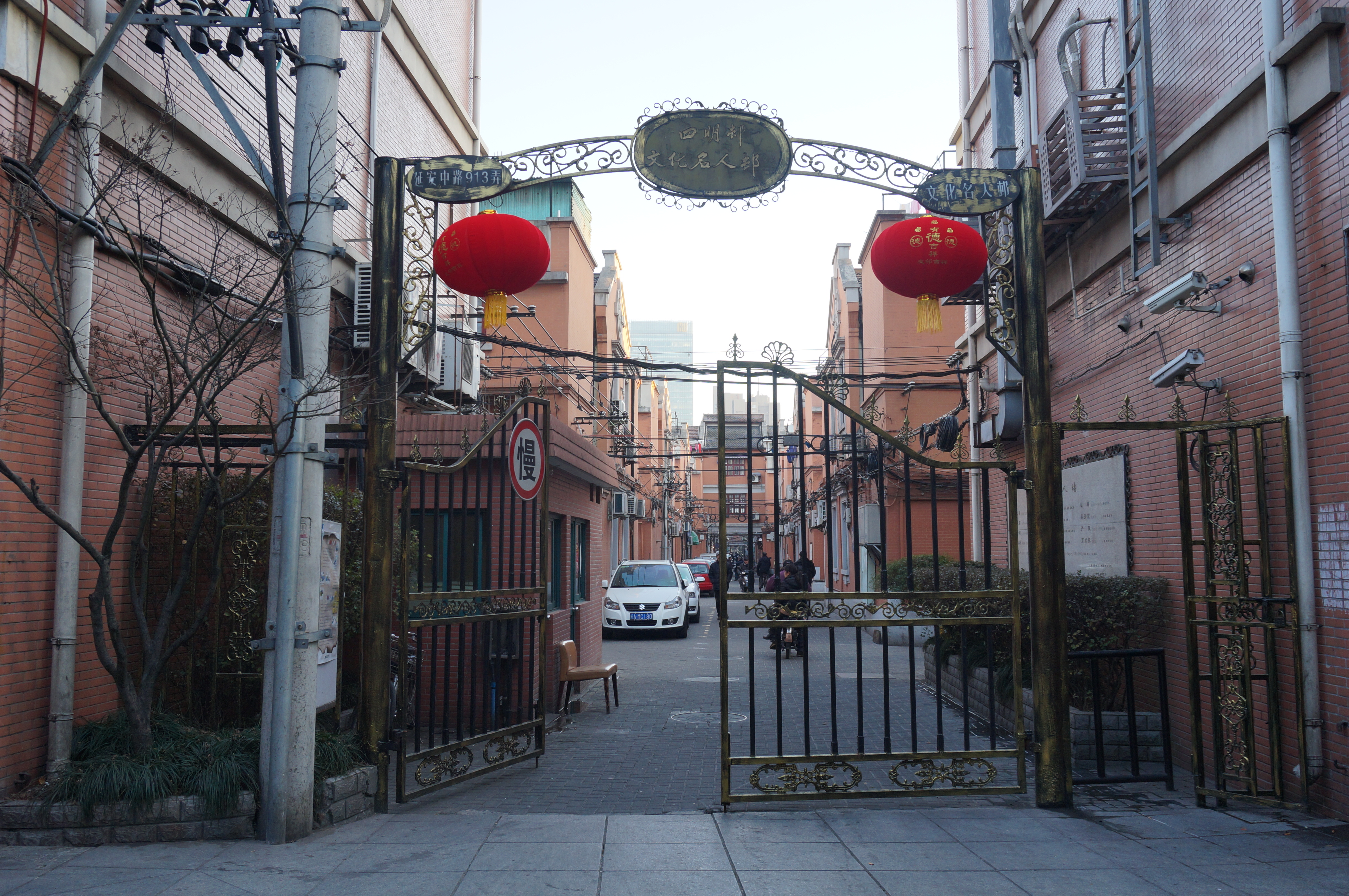 四明村的北门